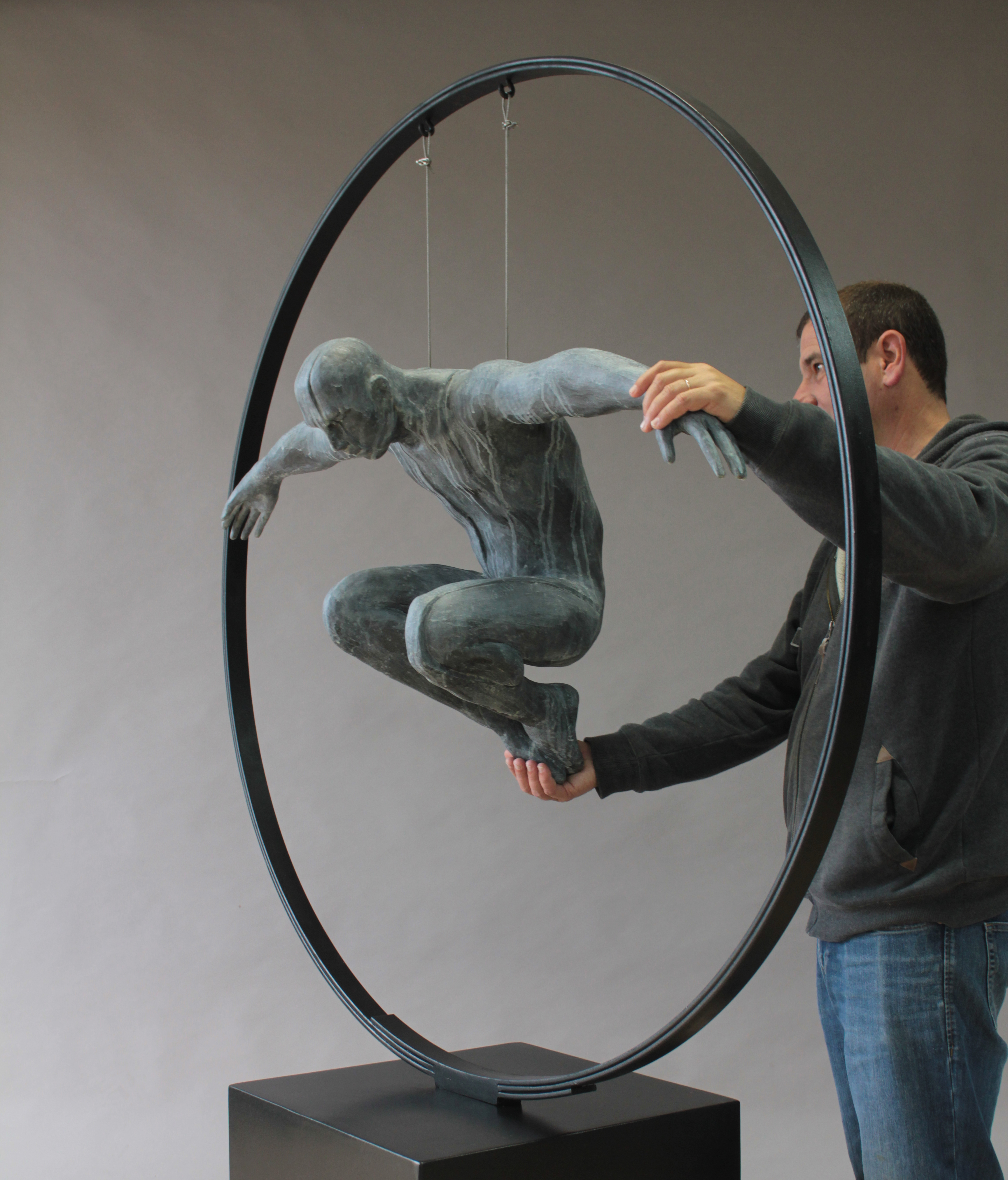 Escultura em bronze do escultor português Rogério Timóteo